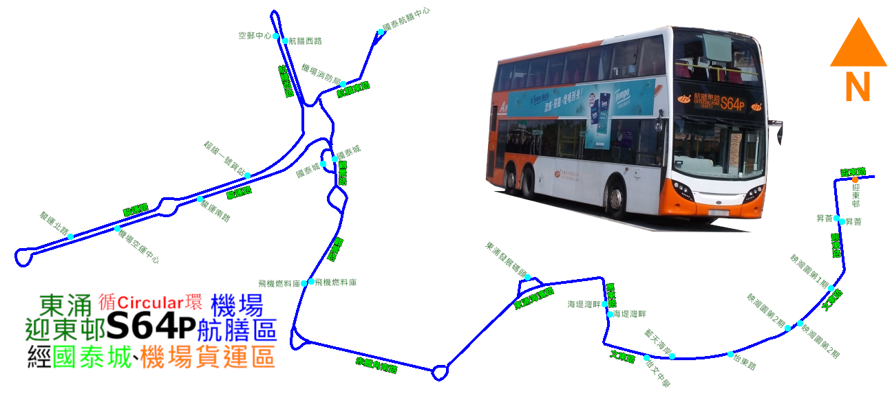 中文（香港）: 龍運巴士S64P線的走線圖